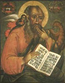 Святитель Андрій Кесарійський